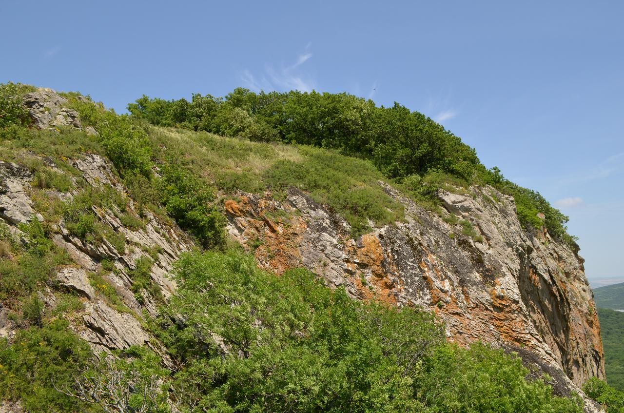 Поход на горы Медовая и Кабанка, 15.06.2019